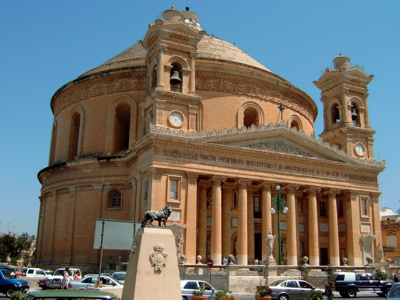 Rotunda of St. Marija Assunta, Malta